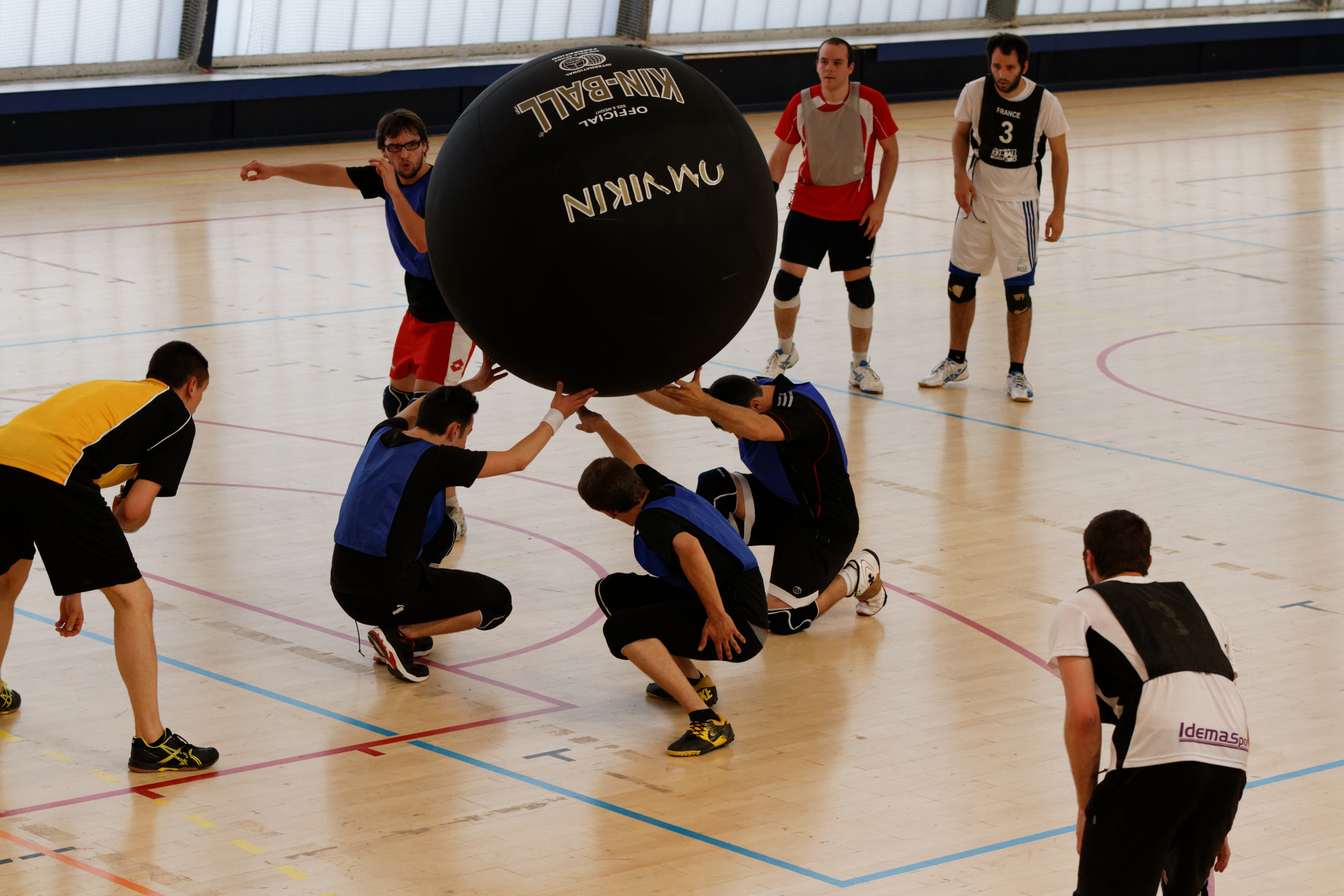 20e journée du championnat de France 2013-2014 de Kin-Ball, 8 juin 2014, Gymnase George Carpentier, Paris.